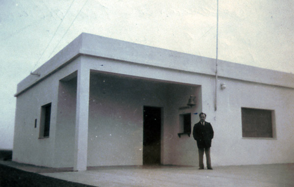 Edificio de la Estación Rawson del FCCC